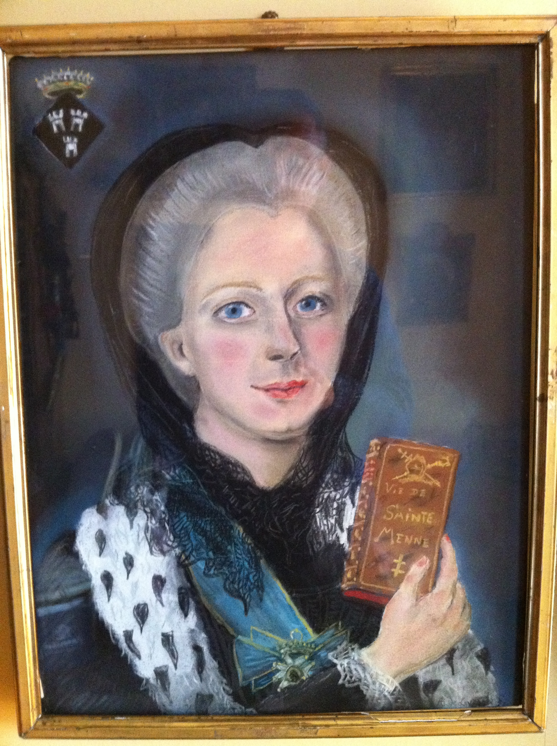 Jeanne de Lavaulx en chanoinesse de Poussay